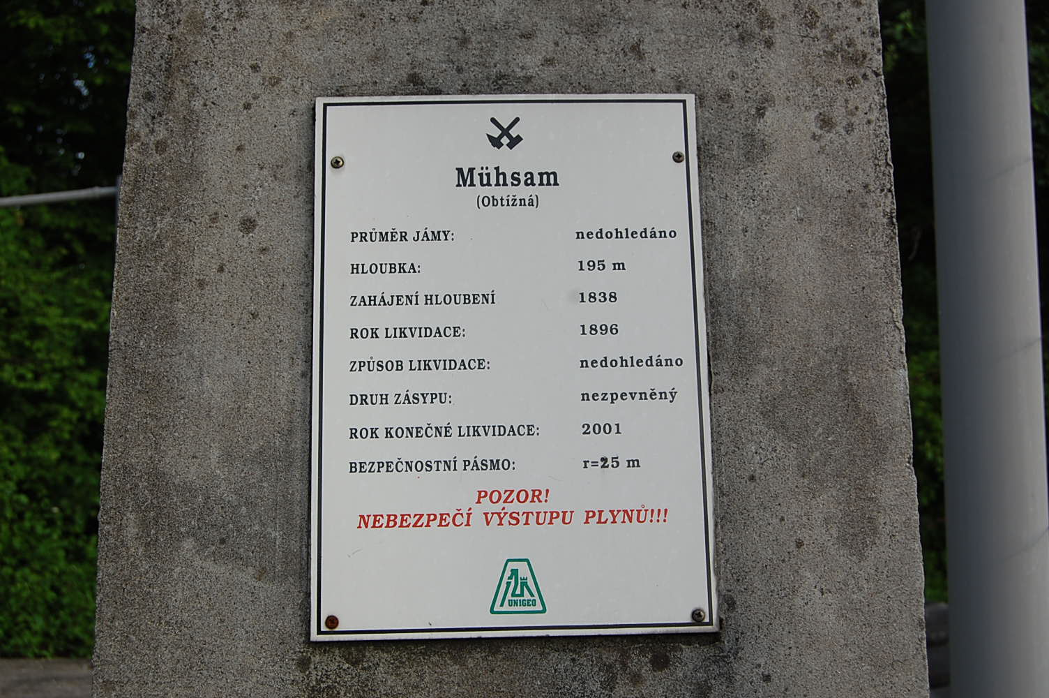 Orlová-Město, jáma Mühsam, místo bývalého černouhelného hlubinného dolu. Informační tabule